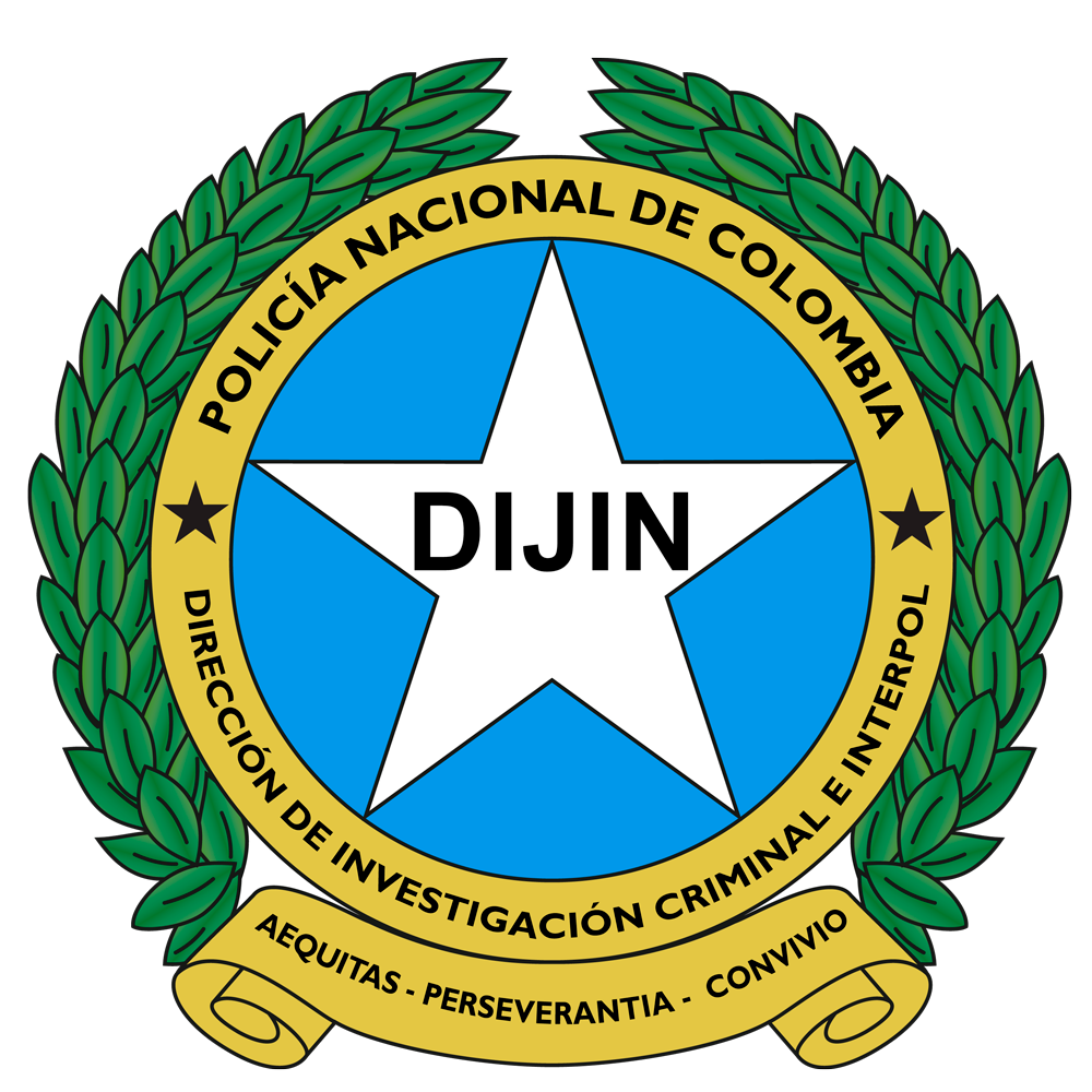 Escudo Dirección de Investigación Criminal e INTERPOL (DIJIN)